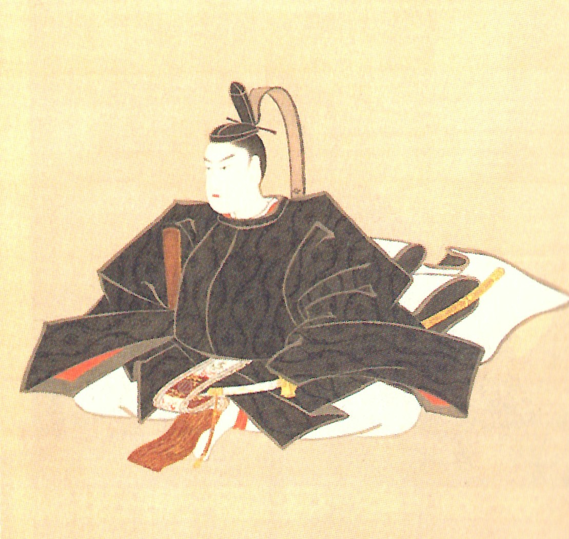 伊達周宗の肖像。